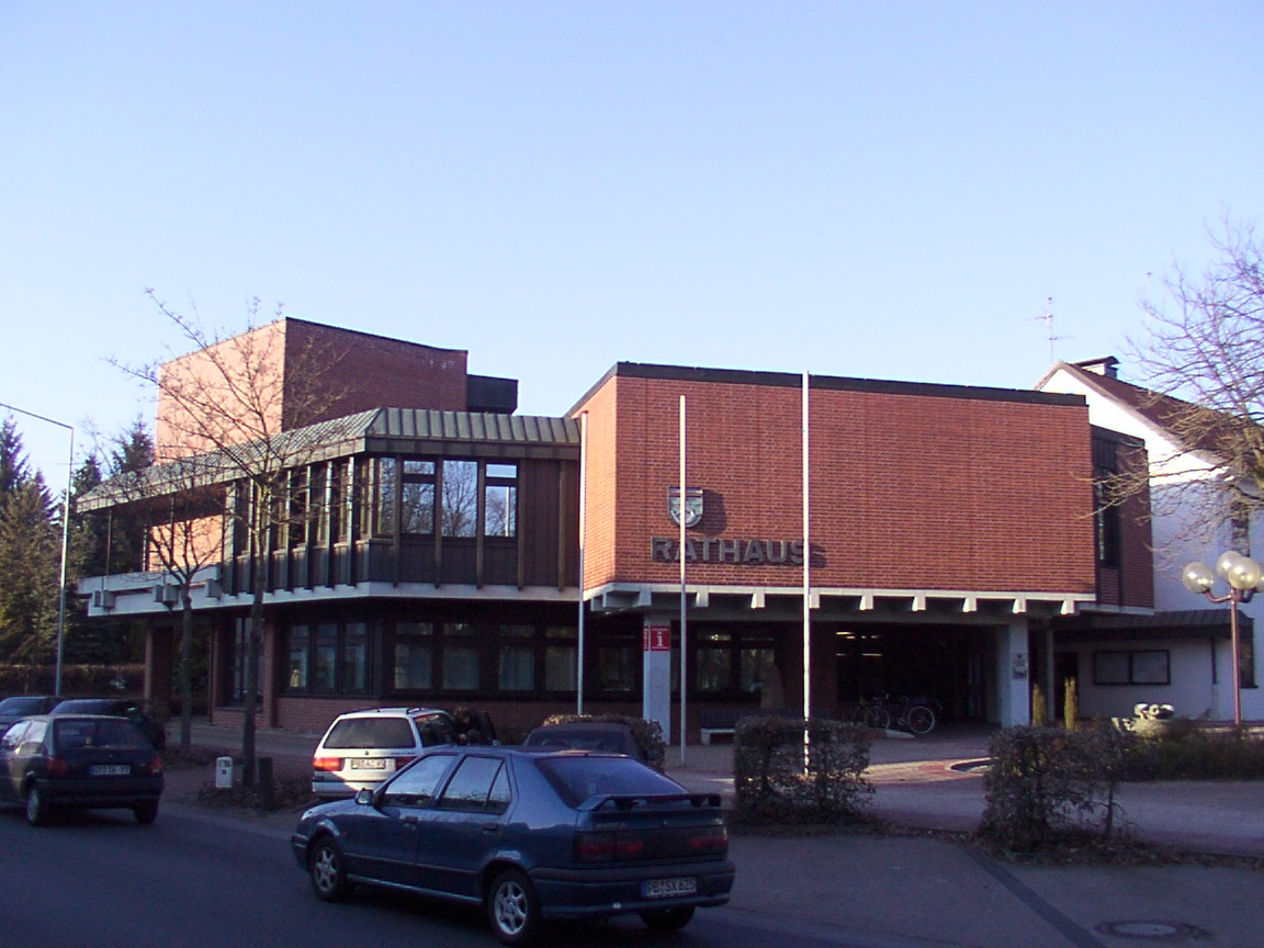 Hövelhof: Rathaus